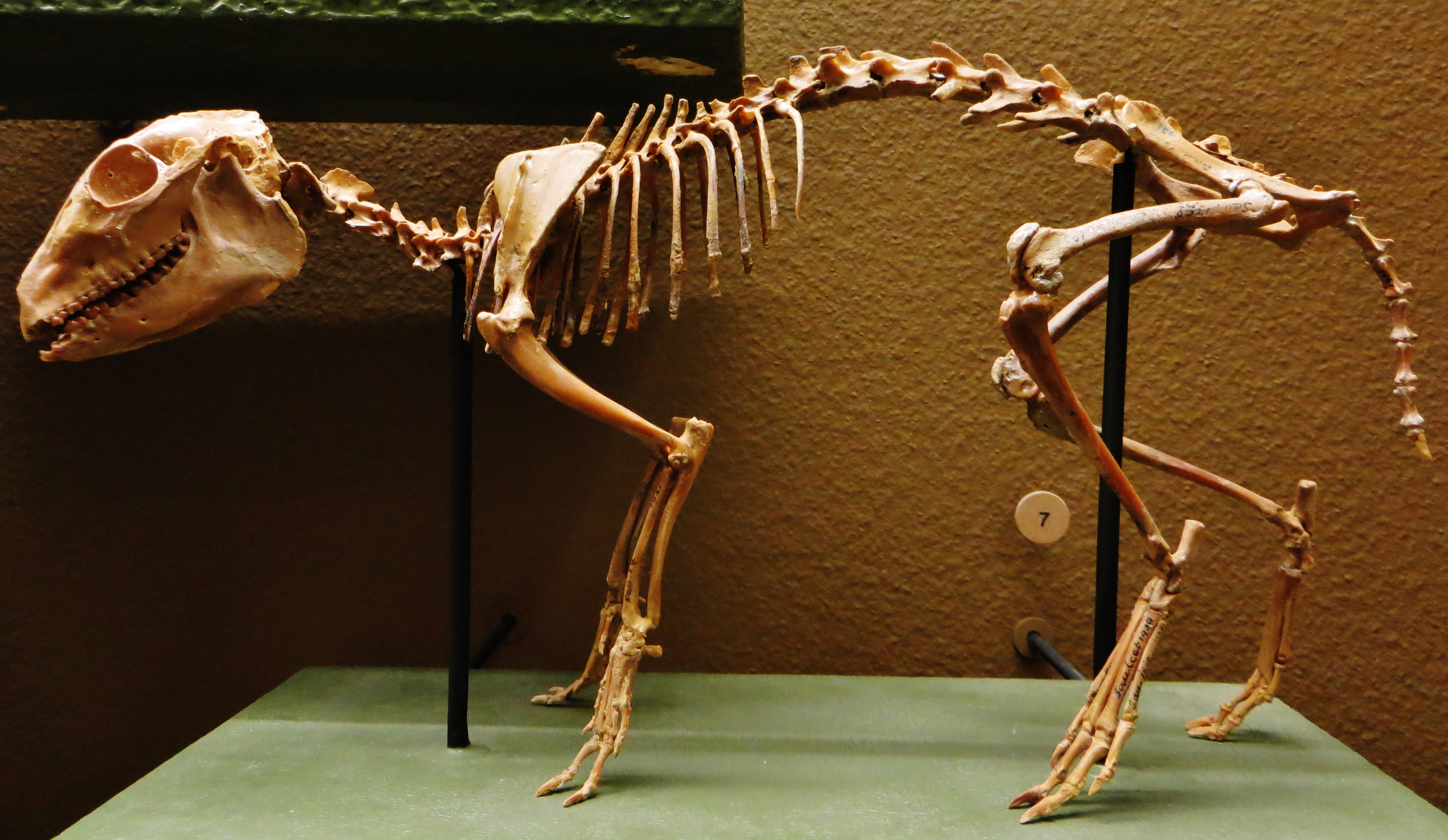 Fossil of Cainotherium - Took the picture at Natural History Museum, Basel